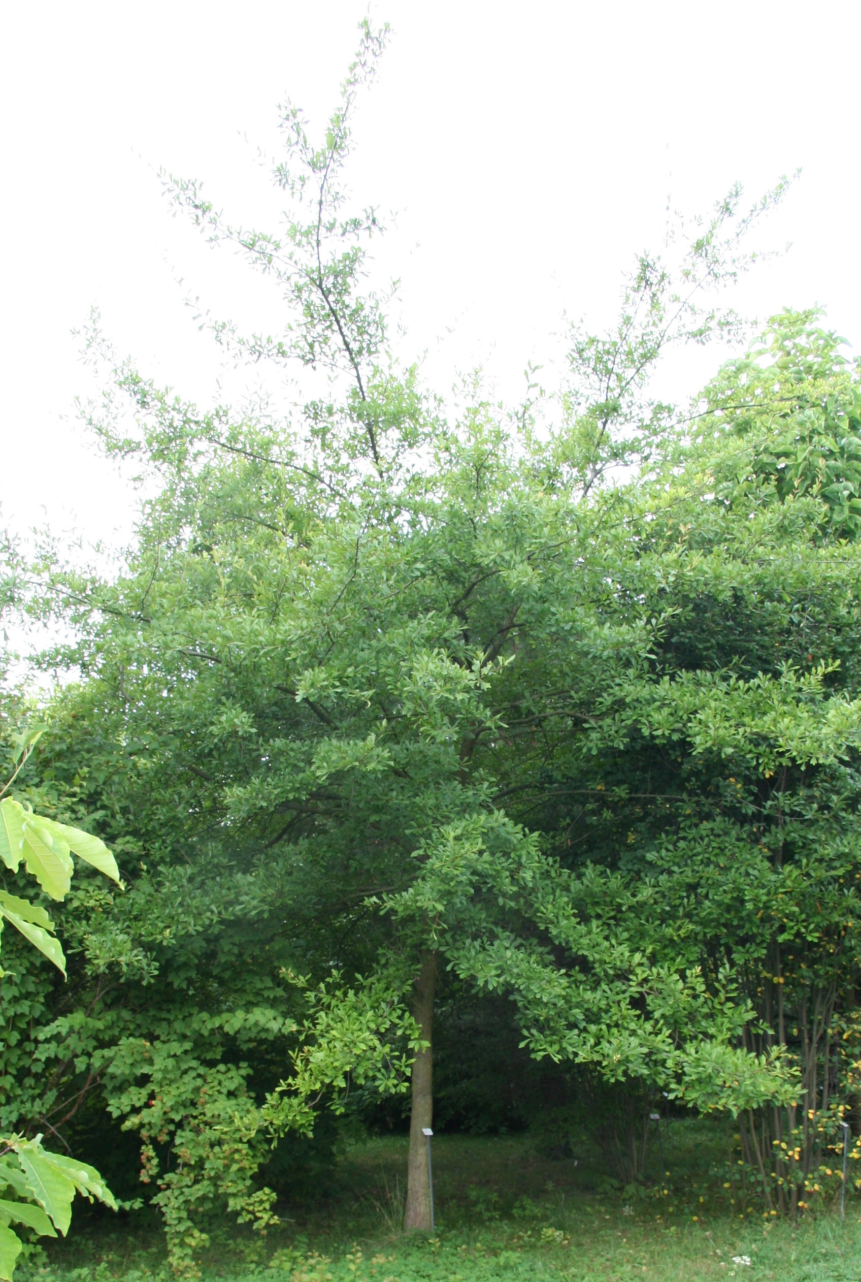 Quercus nigra im Botanischen Garten Dresden